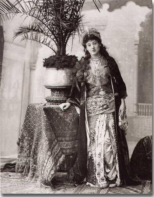 Julia Bartet, portrait par Nadar